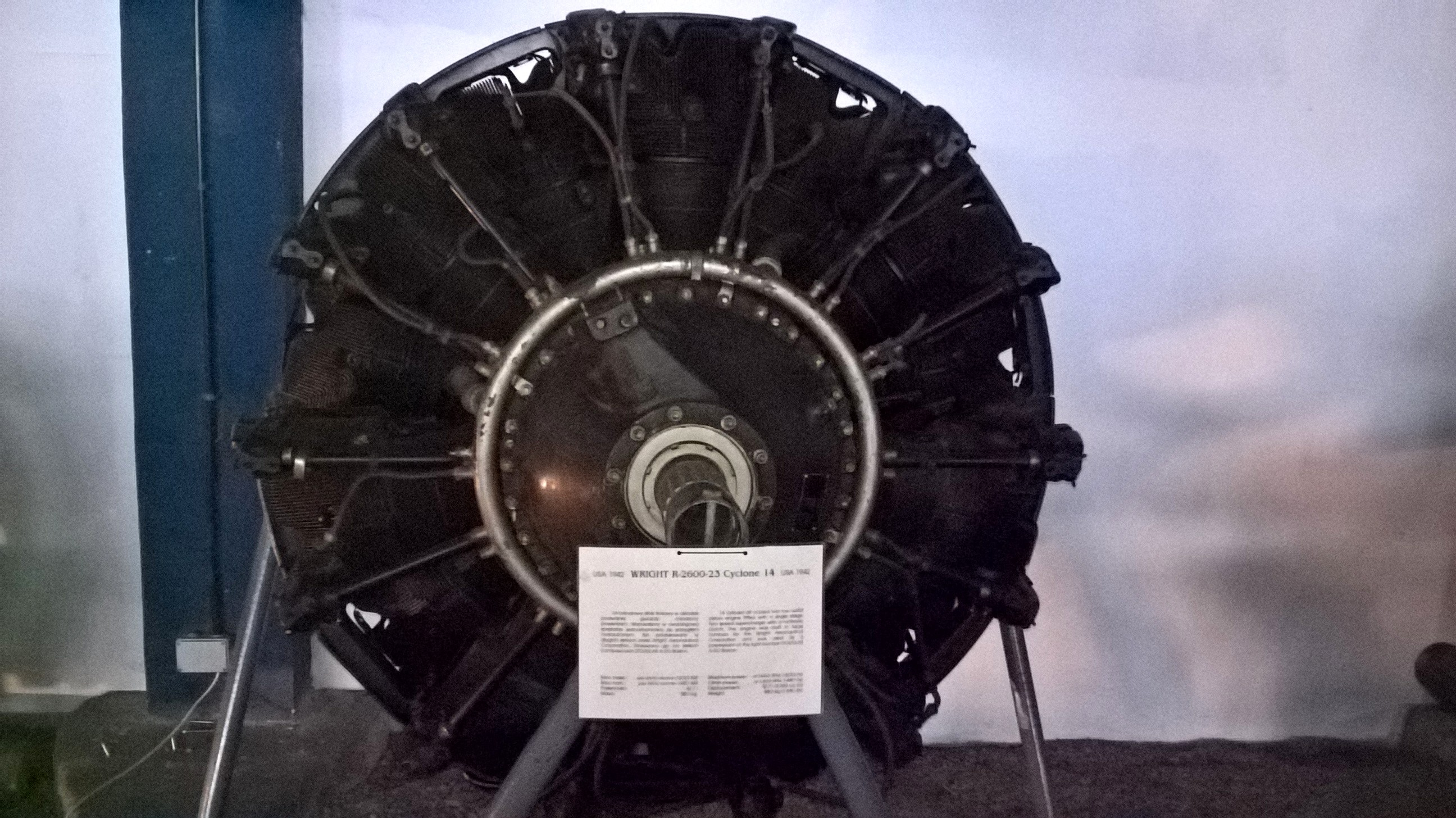 Amerykański 14-cylindrowy silnik gwiazdowy Wright Cyclone R-2600-23 z 1942 r. ze zbiorów Muzeum Lotnictwa Polskiego w Krakowie.